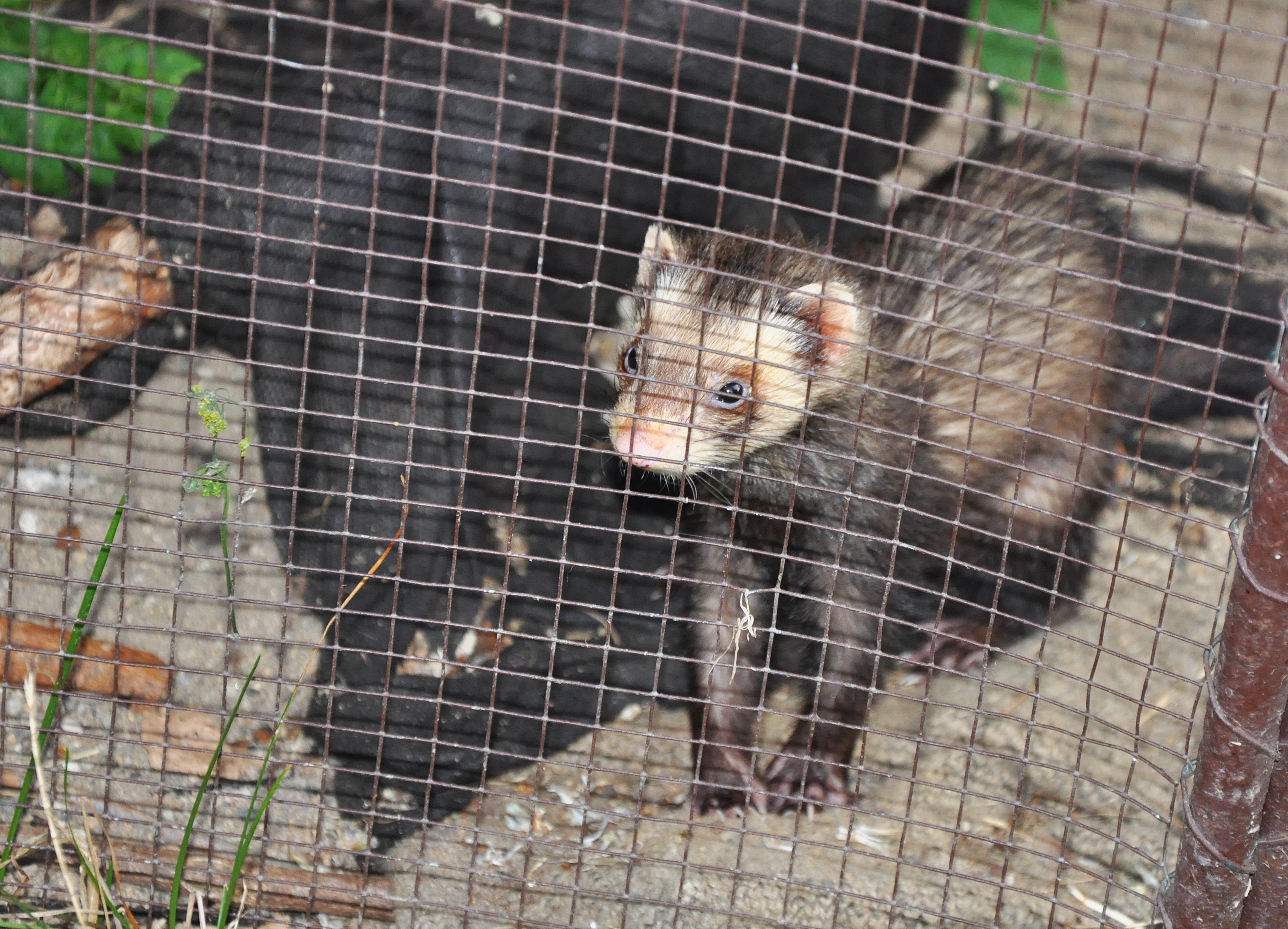 Přirozený výskyt vysoce ohrožených druhů fauny a flory